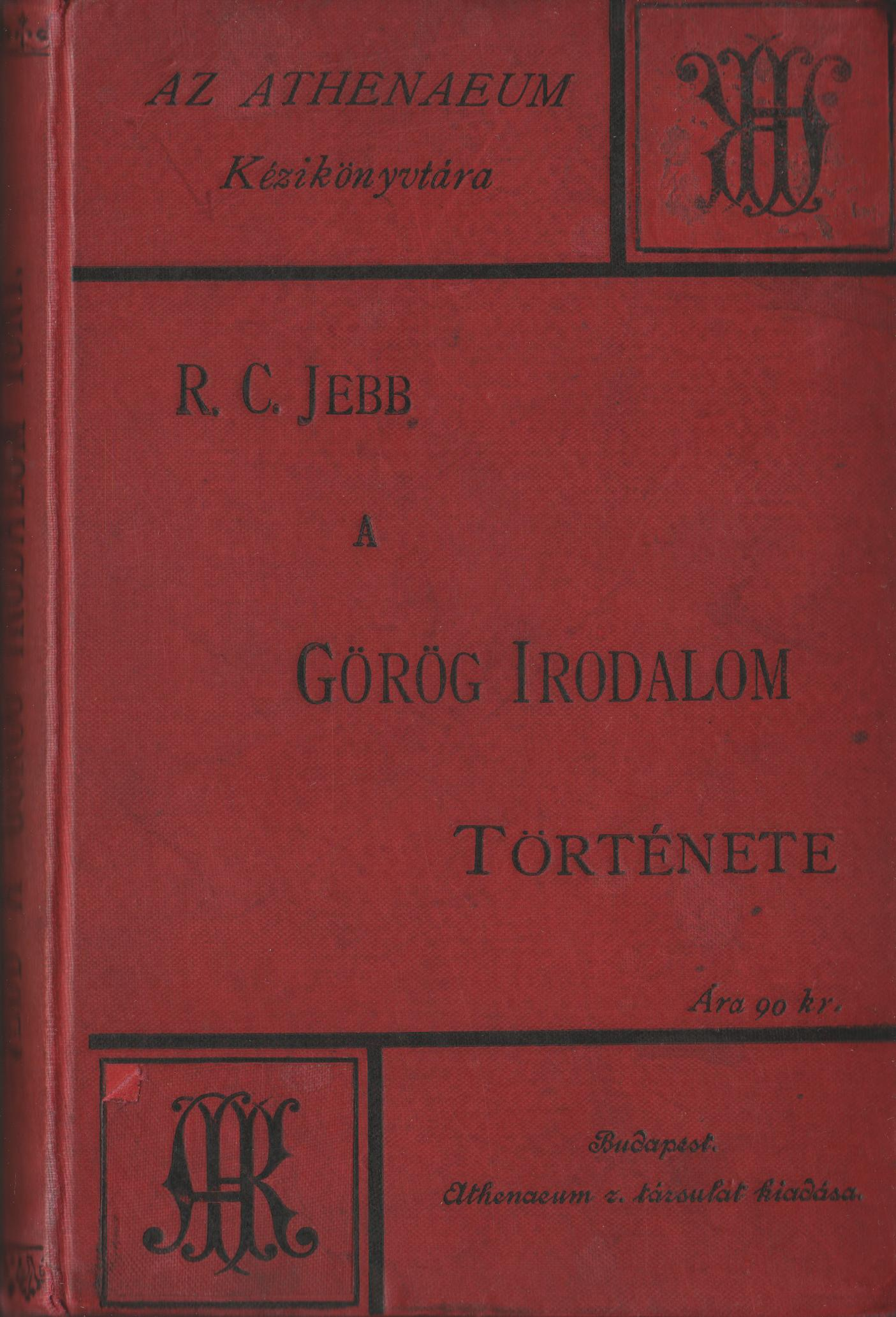 Az adott mű borítója.